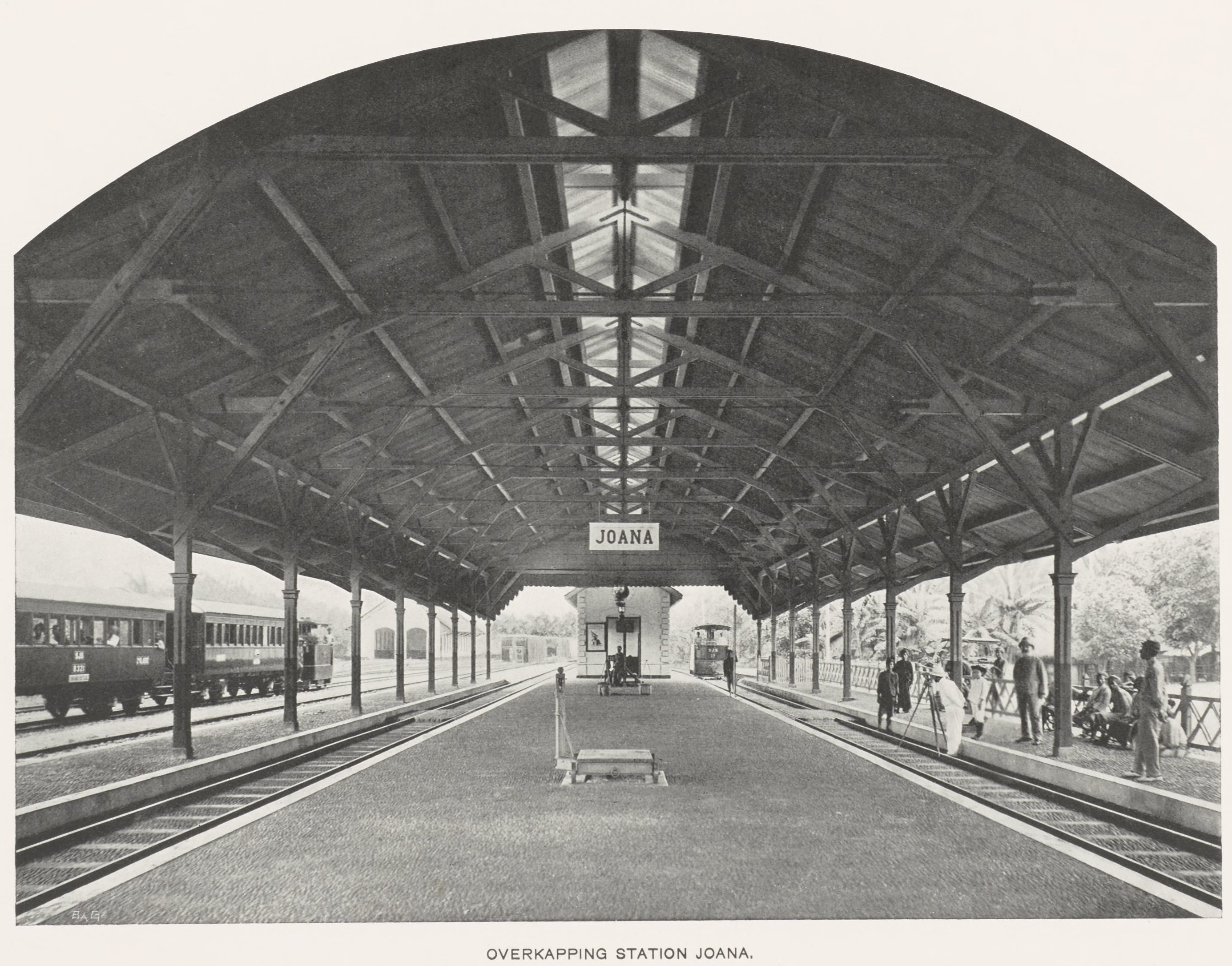 Overkaping Stasiun Juana